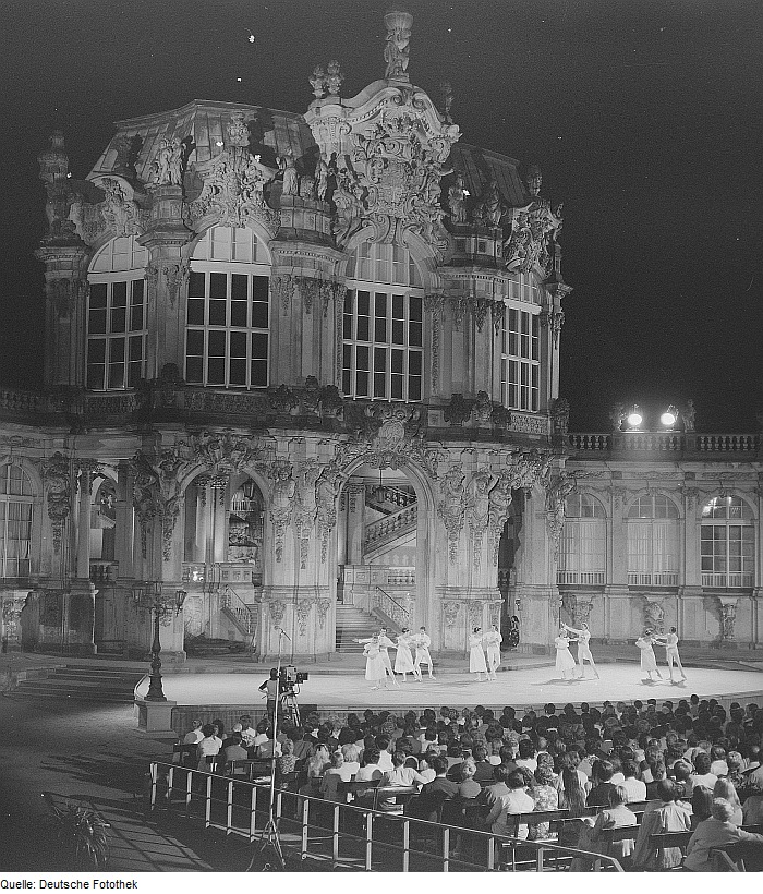 Original image description from the Deutsche Fotothek Dresden. Zwinger, Ballettaufführung vor dem Wallpavillon